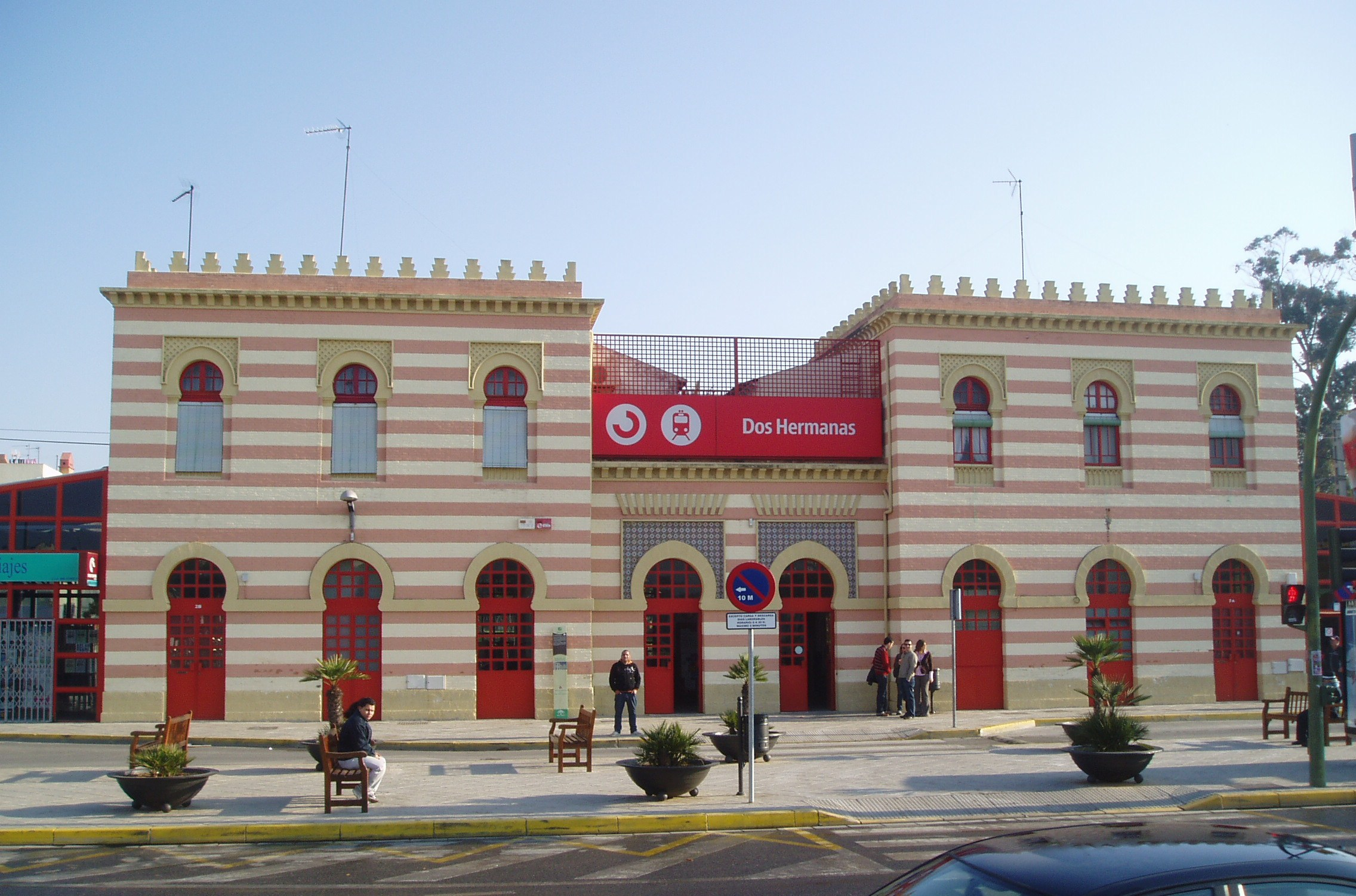 Estación de ferrocarril de Dos Hermanas (Sevilla) España